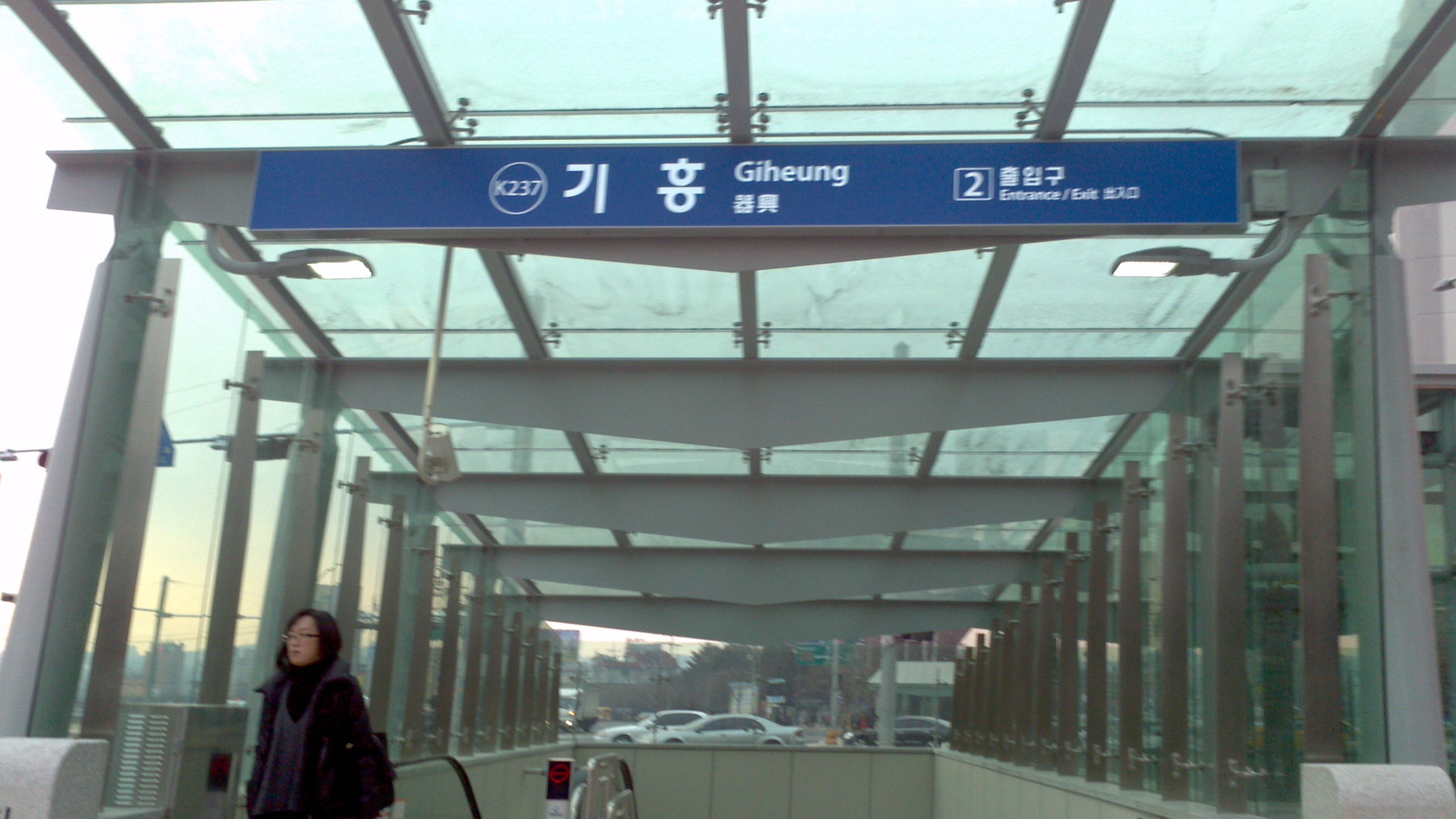 기흥역 2번 출구